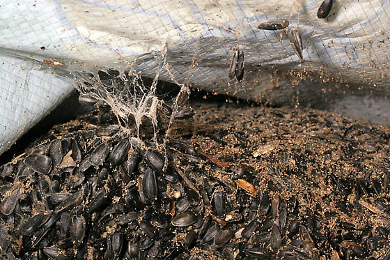 Plodia interpunctella damage